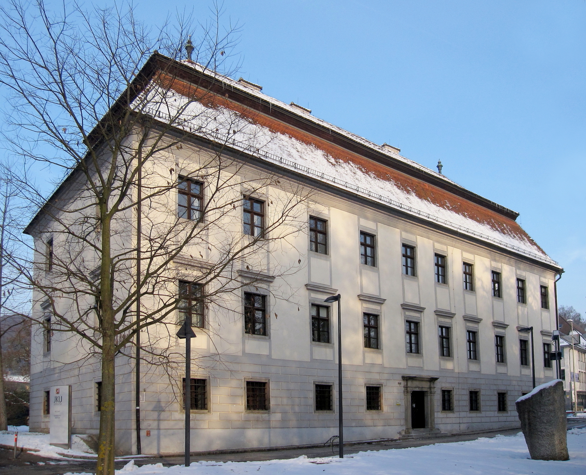 Schloss Auhof Linz Südfront, davor die Skulptur Wächter von Alfred J. Hager